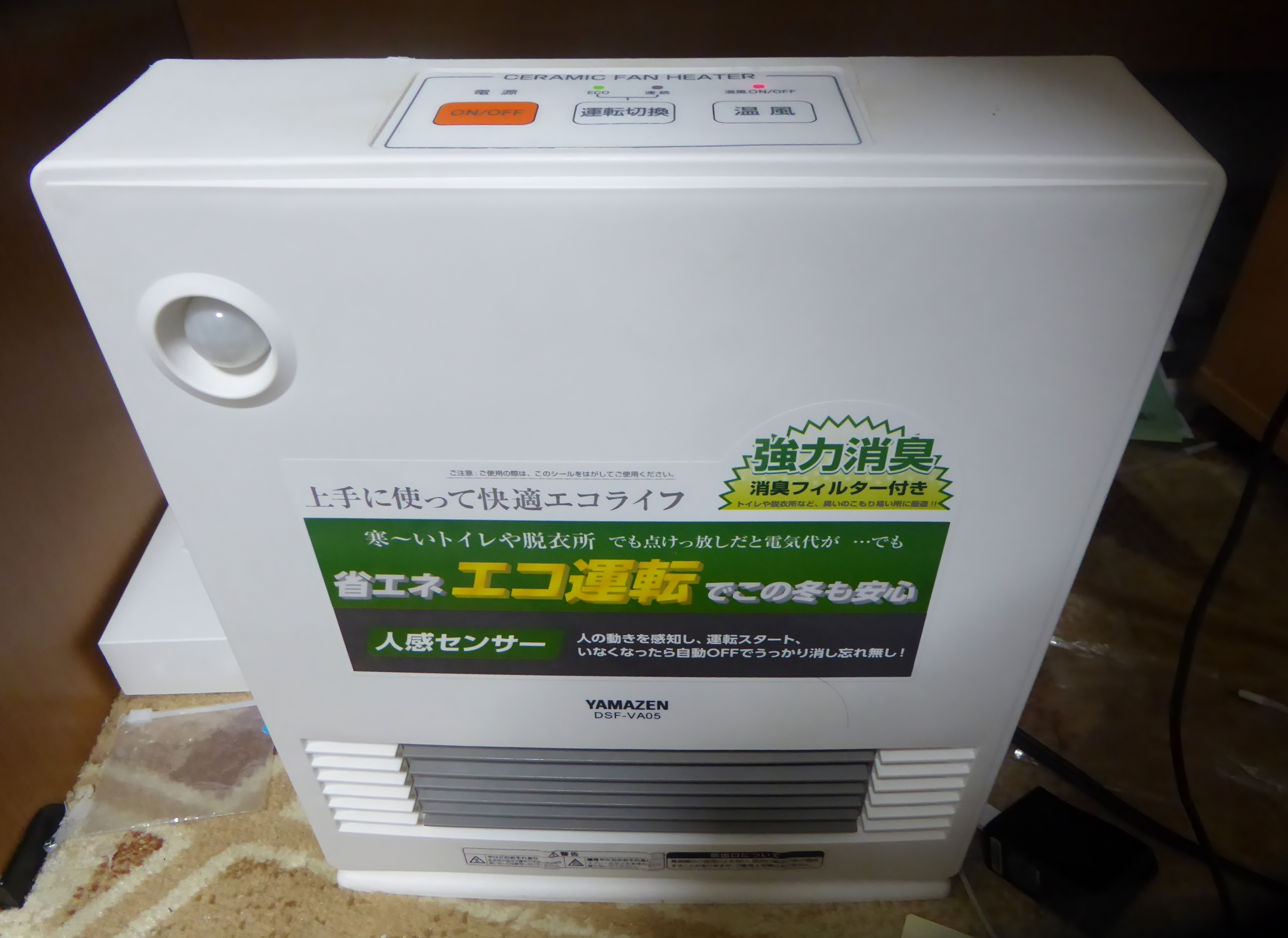 山善DSF-VA05を撮影。